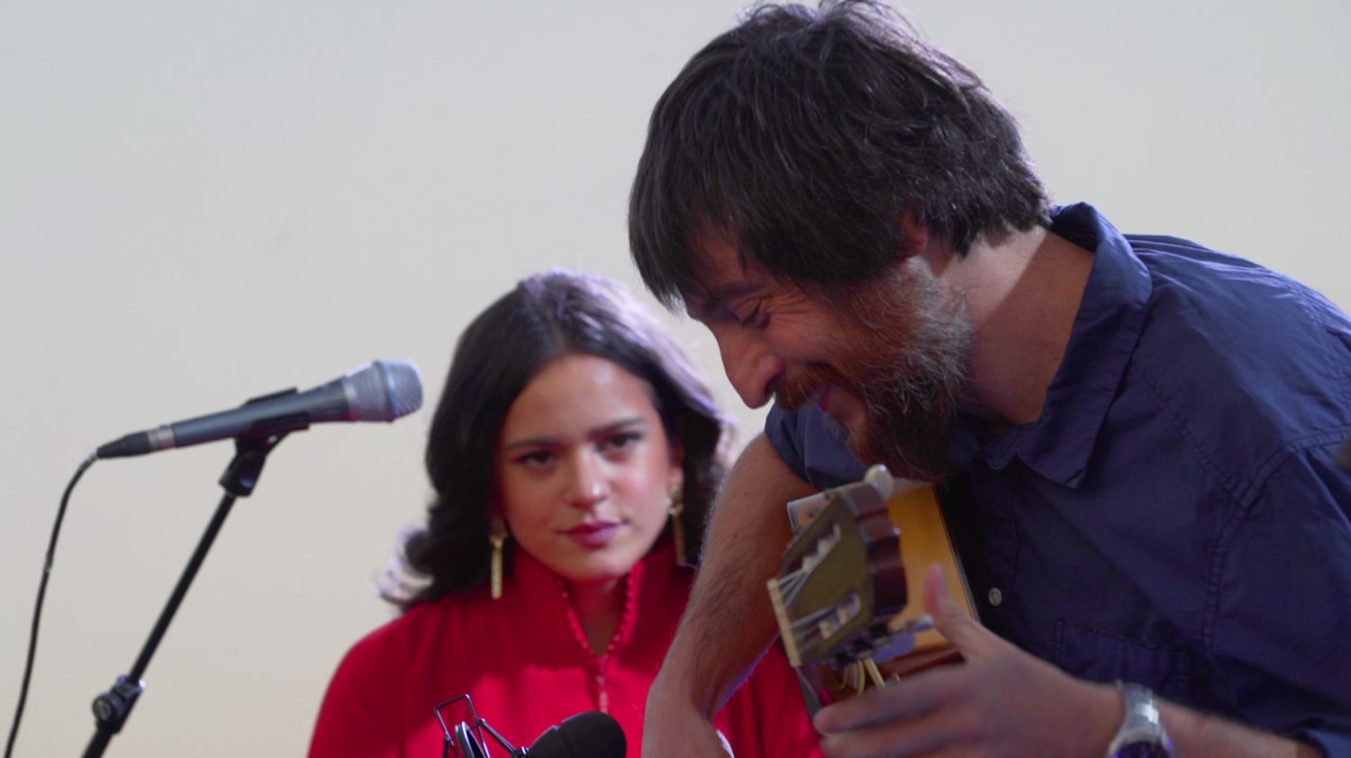 La cantaora barcelonesa Rosalía y el guitarrista Raül Refree, en equilibrado y armónico tándem musical, ofrecieron ayer, domingo 23 de julio, un concierto lleno de emoción y sentimiento que entusiasmó al público. El auditorio al aire libre del Parque de la Cuña Verde de O’Donnell, en el distrito de Moratalaz, tuvo el aforo completo. También se registró un lleno total en la pantalla de apoyo que se instaló con 300 plazas en el mismo parque para quienes no pudieron acceder al recinto.